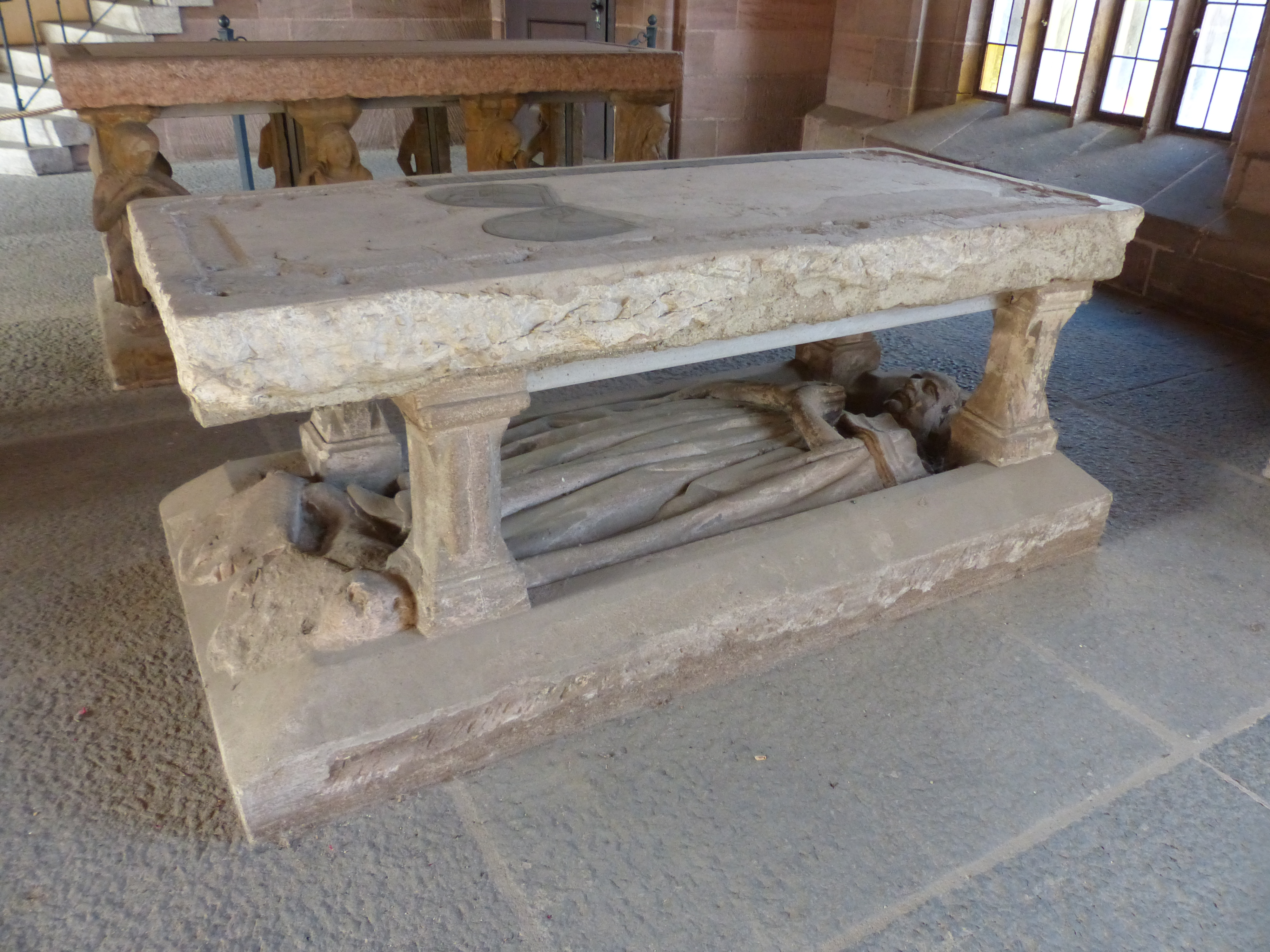 Grabmal von Herdegen Valzner im Heilig-Geist-Spital in Nürnberg